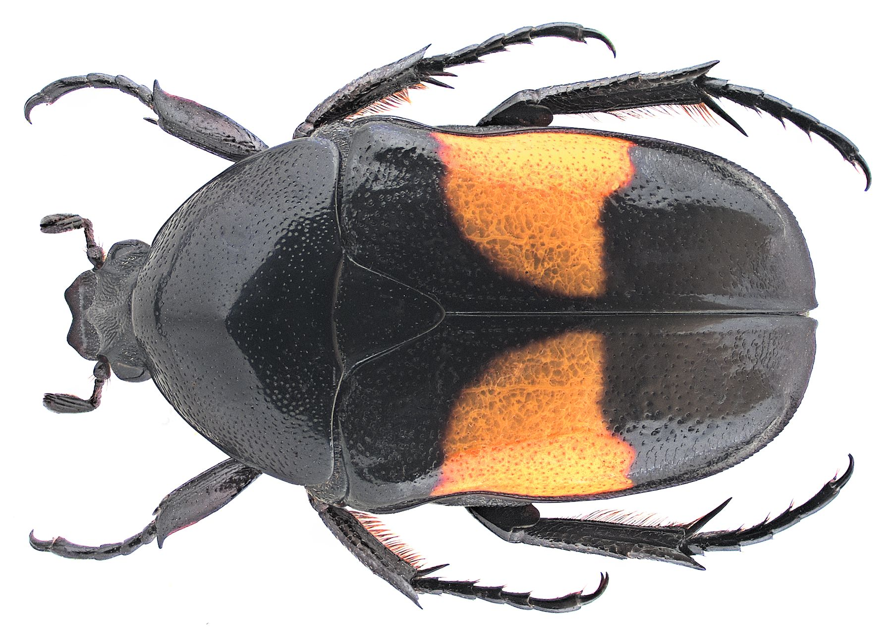 Familie: Scarabaeidae Länge: 16 mm Verbreitung: Westafrika Fundort: Gambia, Serekunda leg.det. U.Schmidt, 1990 Foto: U.Schmidt, 2008